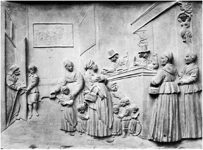 Inschrijving der bedeelden, zandstenen reliëf. Deze steen is omstreeks 1650 aangebracht in de gevel van een Amsterdams grachtenhuis, waar arme burgers zich laten inschrijven om in aanmerking te komen voor bedeling (gemeentelijke steun).